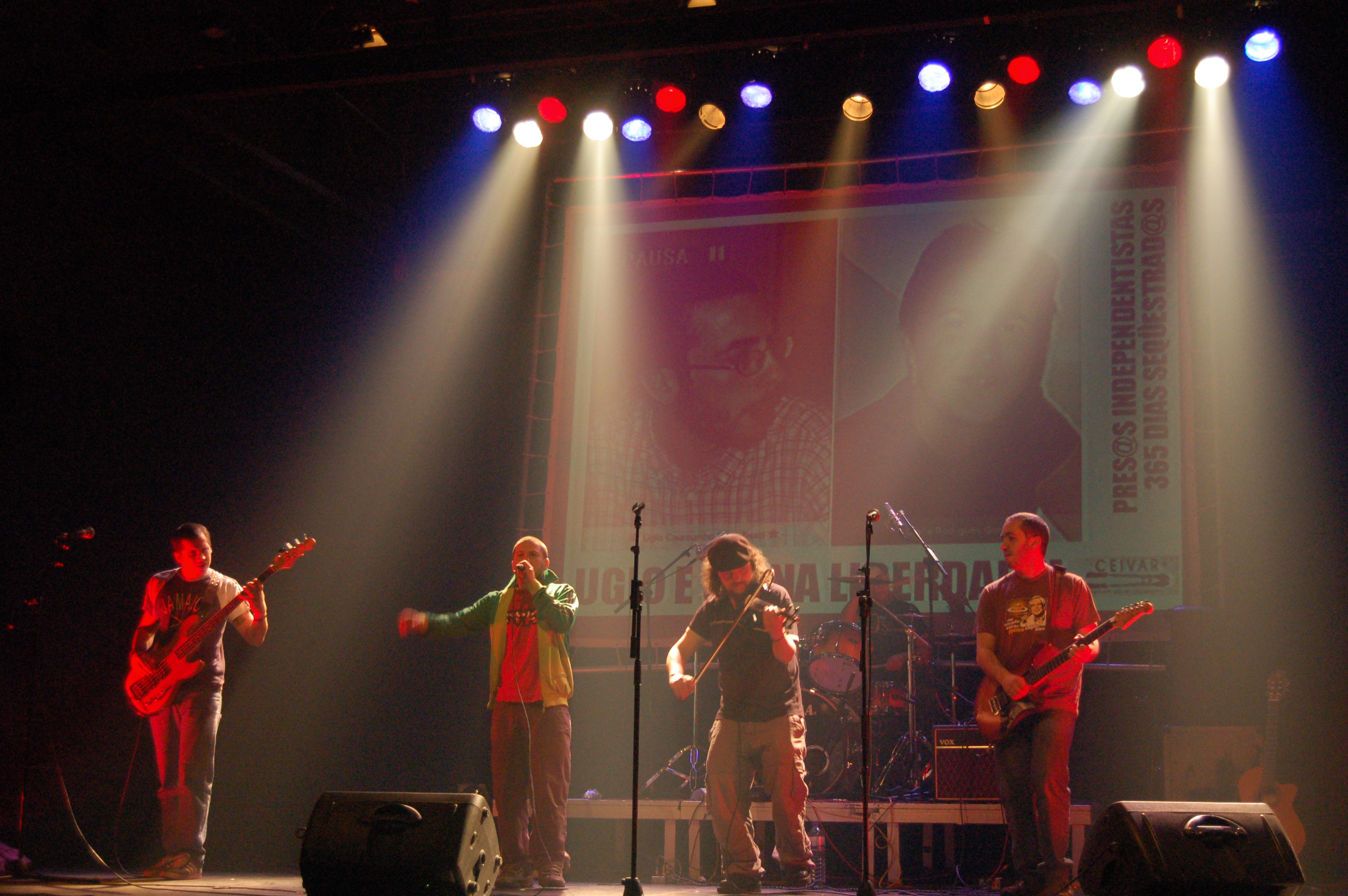 Som do Galpom en concerto na Sala Nasa de Santiago de Compostela en solidariedade cos presos políticos Ugio e Giana